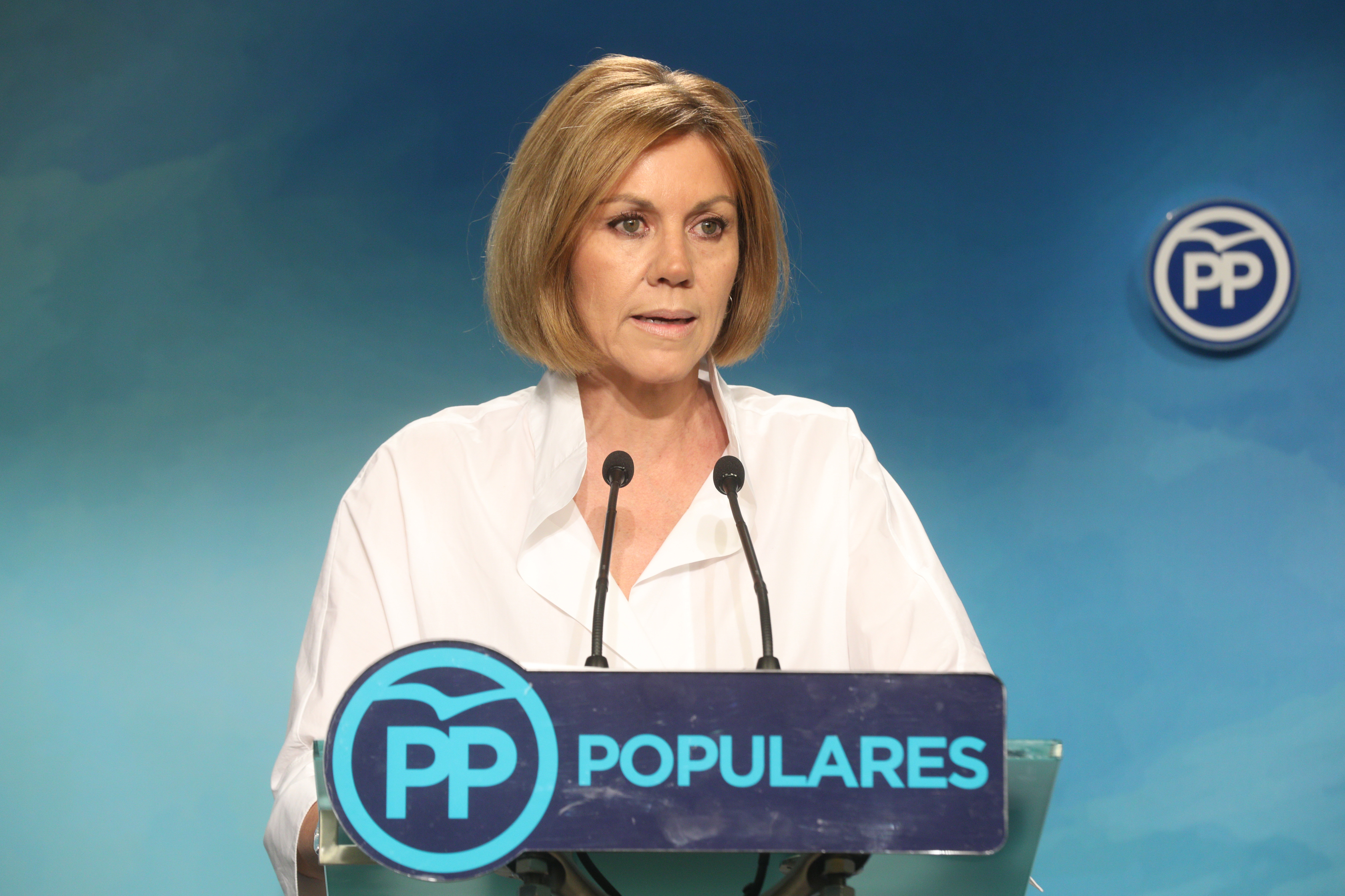 Maria Dolores de Cospedal.